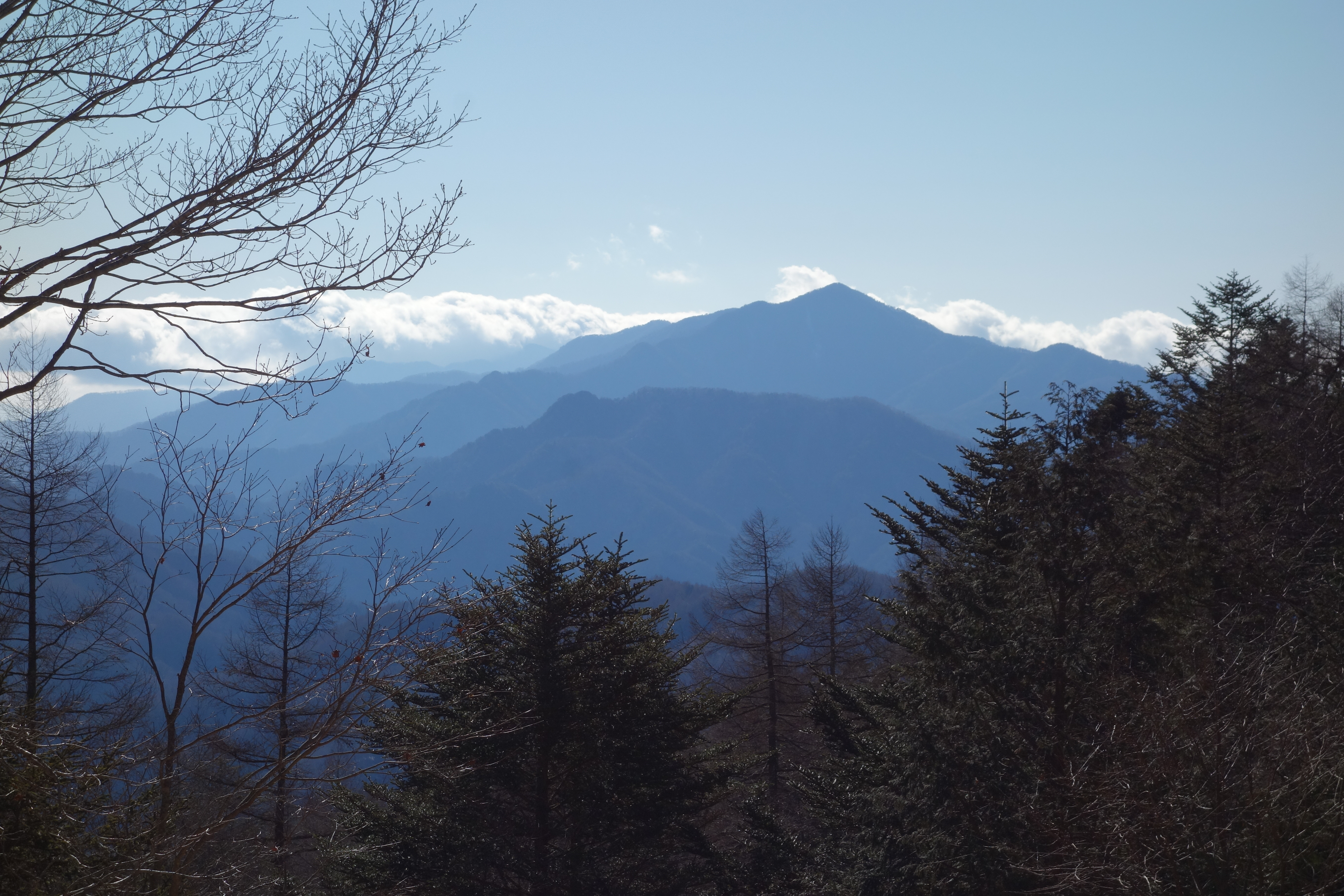 笠取小屋から見た黒川鶏冠山と大菩薩嶺